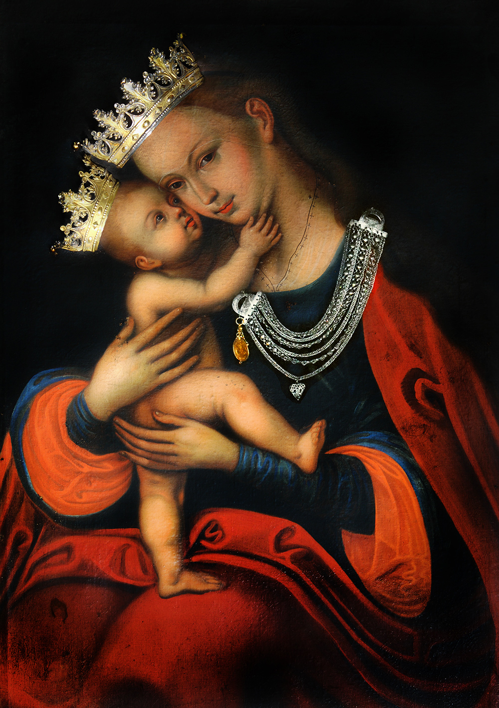 A bodajki kegyképet